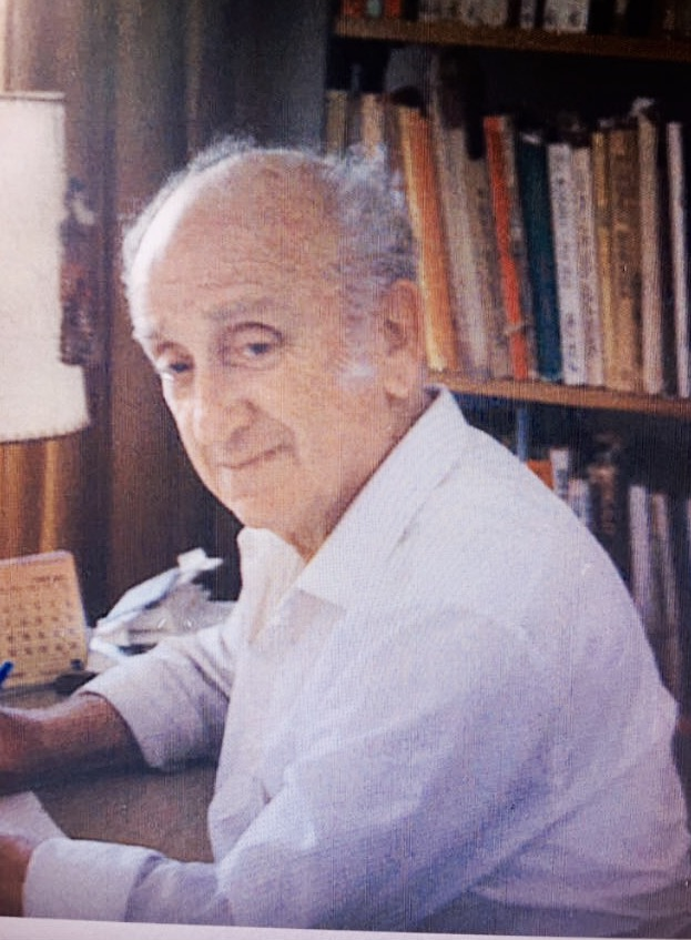 מנחם ברבש